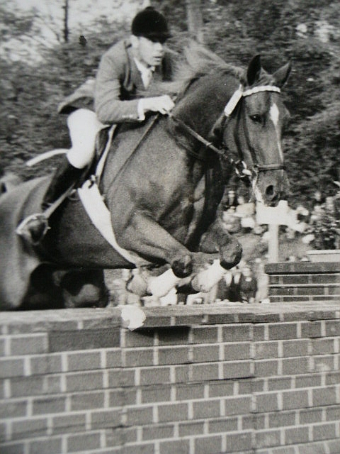 Otto Ammermann auf Servus Wilhelmshaven ,Mitte der 60er. Herr Ammermann und Servus gewannen mehrere SB Springen,waren in Aachen im Großen Preis 3. und haben dort einmal das Meisterspringen gewonnen